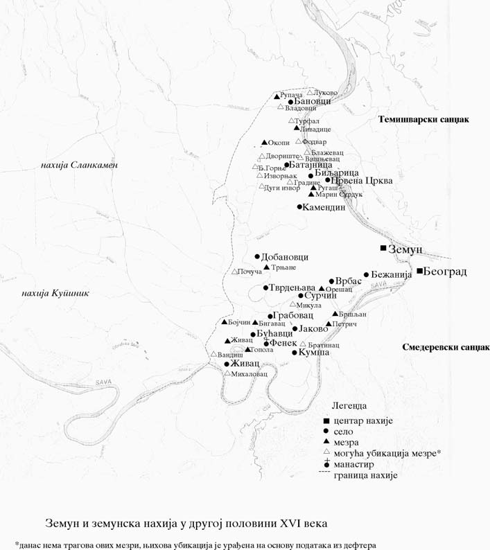 Srpski (latinica): Mapa Zemunske Nahije